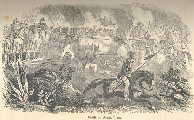 Amerikansk fremstilling af slaget ved Buena Vista